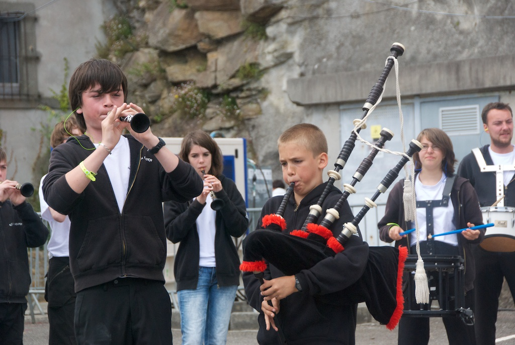 Tonnerres de Brest 2012 Bagad école de Plougastel en Penfeld